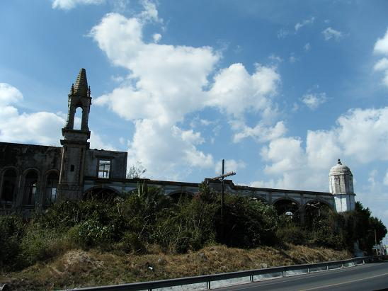 Ruinas de la Ex-Hacienda de San José Cuaracurío de Uriangato.